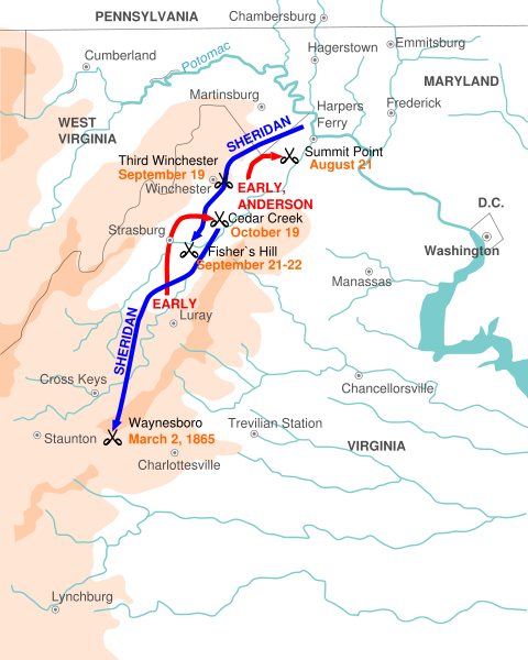 2. del af Shenandoah kampagnen i 1864